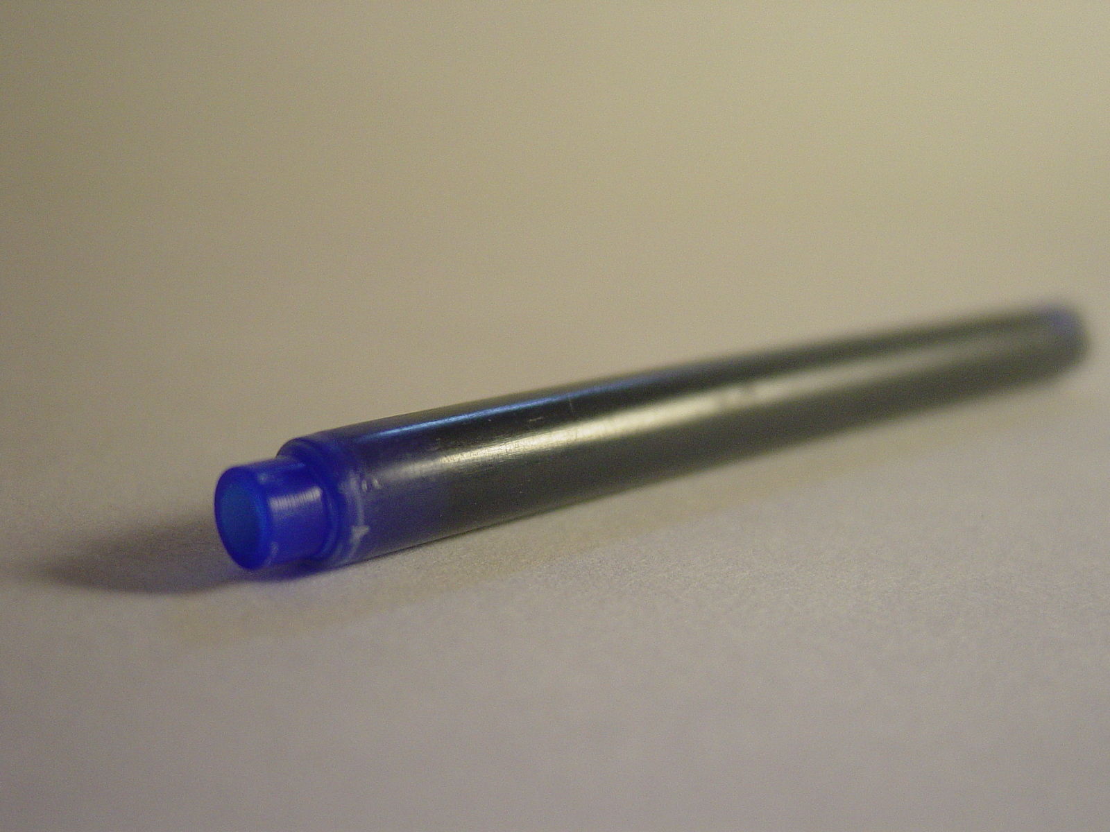 eine Tintenpatrone